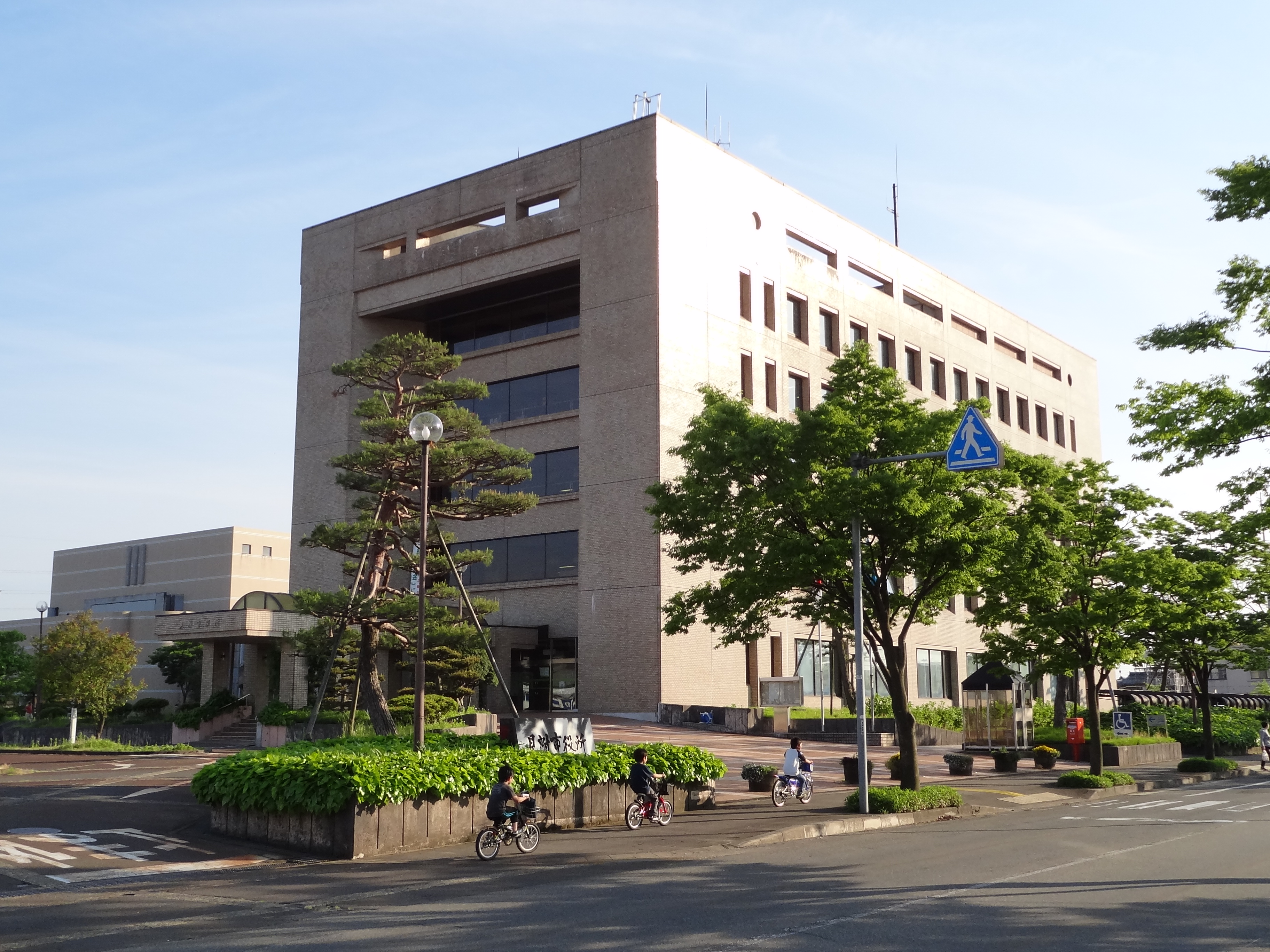 見附市役所